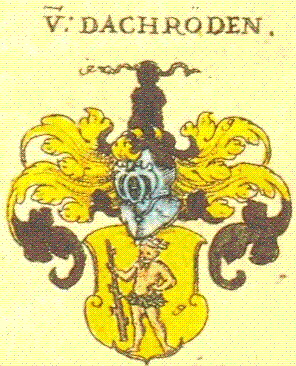 Wappen der Familie von Dachröden nach Siebmachers Wappenbuch